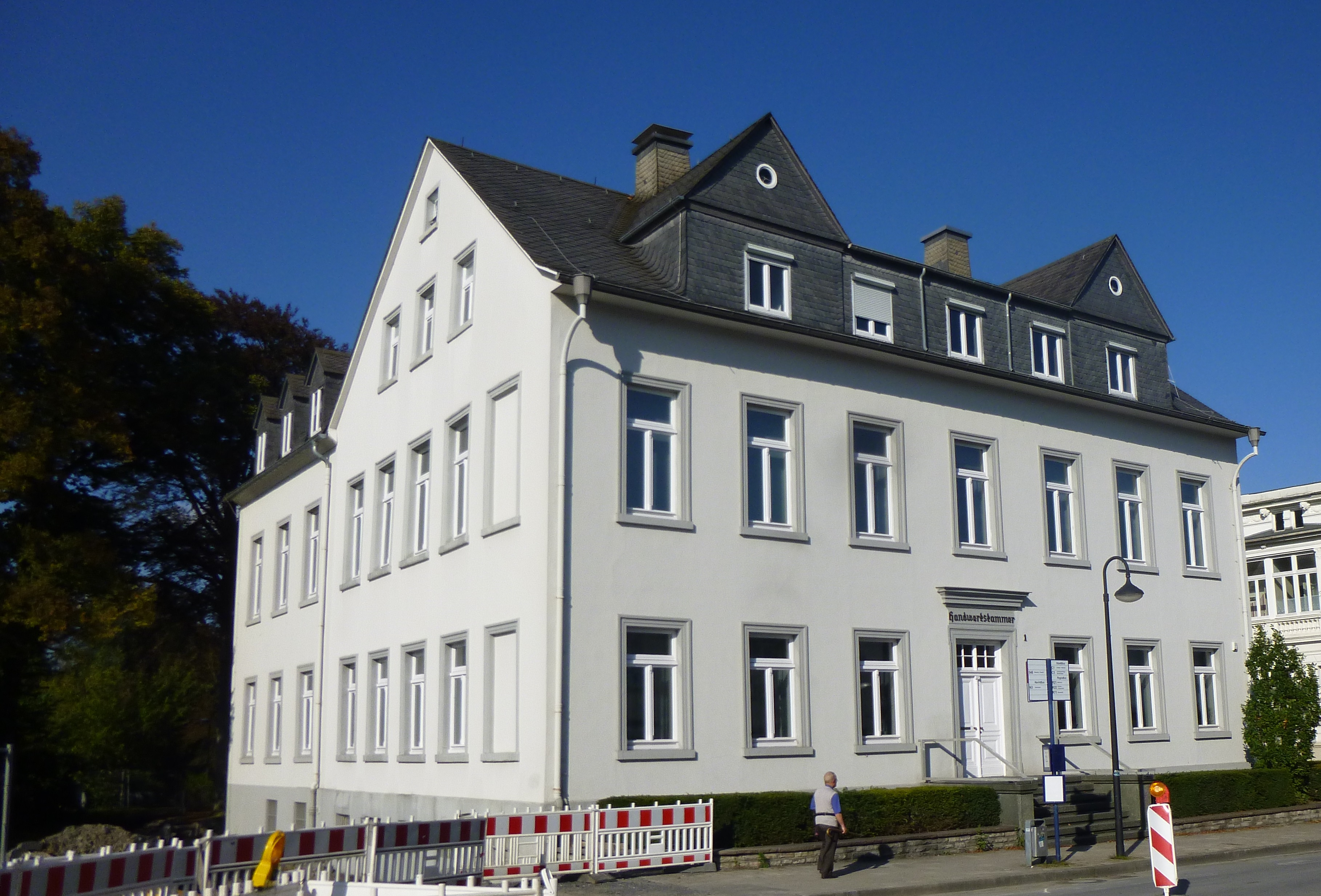 Villa Cosack (heute Handwerkskammer) Brückenplatz 1 (Arnsberg)